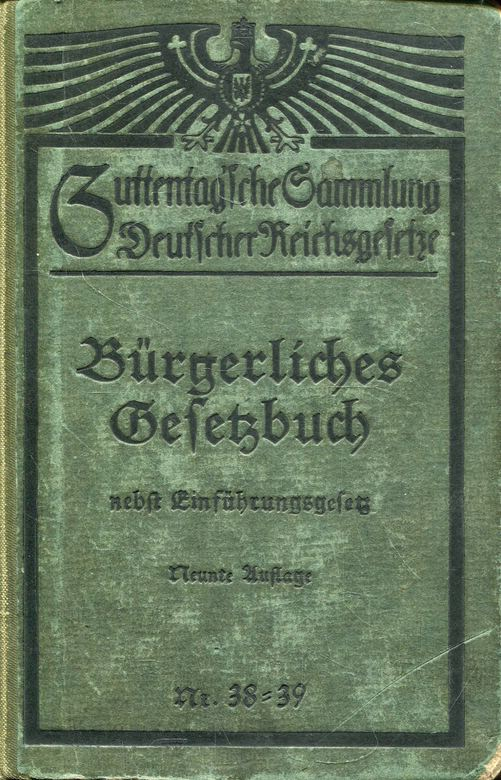 Bürgerliches Gesetzbuch nebst Einführungsgesetz. Guttentagsche Sammlung Deutscher Reichsgesetze Nr. 38/39